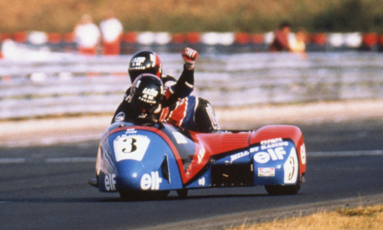 Le poing levé sur la ligne d'arrivée à Budapest est la consécration de 15 saisons de Grands Prix.